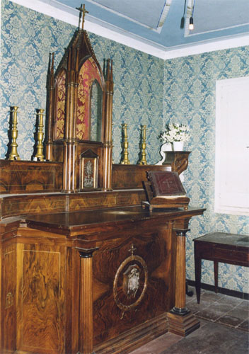 AUTORE: Nicola Mastrocinque. DESCRIZIONE: Altare della cappella Pedicini in Foglianise (BN). NOTA: Essendo io, Nicola Mastrocinque, colui che ha scattato questa fotografia, cedo tale materiale a Wikipedia con la licenza GFDL, di cui ho letto il testo e di cui accetto le condizioni.